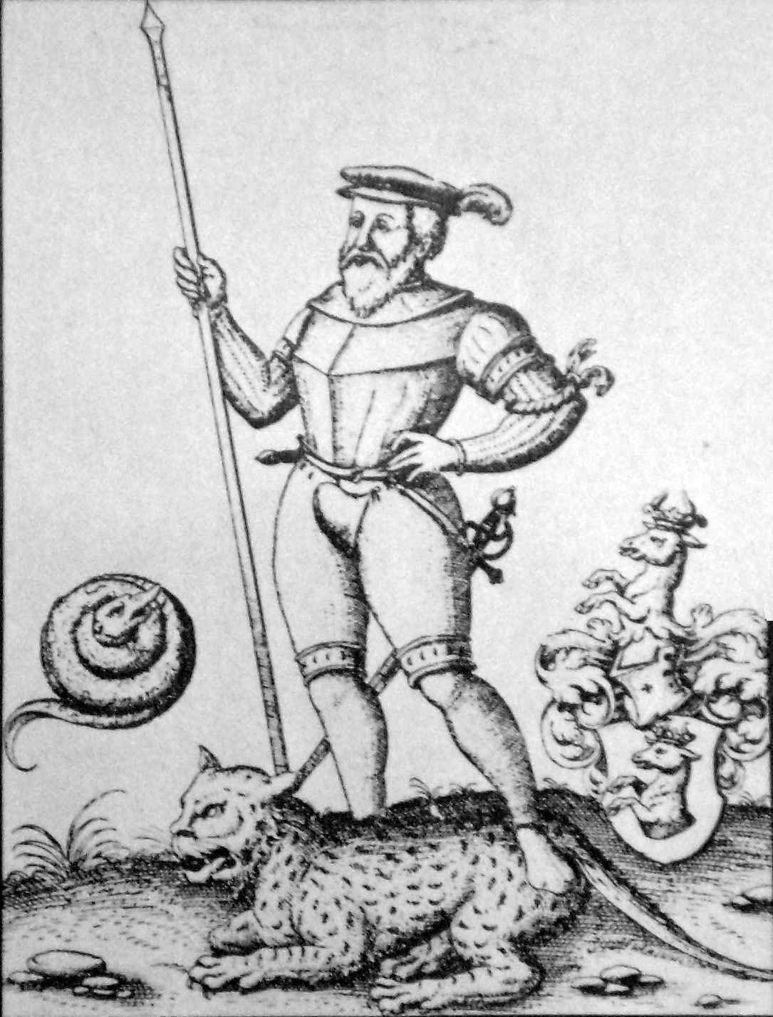 Ulrich Schmidl. Primer cronista del Río de la Plata. Grabado de la edición de su relato en 1599 por Levinus Hulsius (1550–1606) Alternative names Levin HulsiusDescriptionDutch author, publisher and writerDate of birth/death 1550 13 March 1606Location of birth/death Ghent FrankfurtAuthority control : Q1821925 VIAF: 197356837 ISNI: 0000 0001 1641 7327 LCCN: no99039378 DBNL: huls080 GND: 117056235 WorldCat